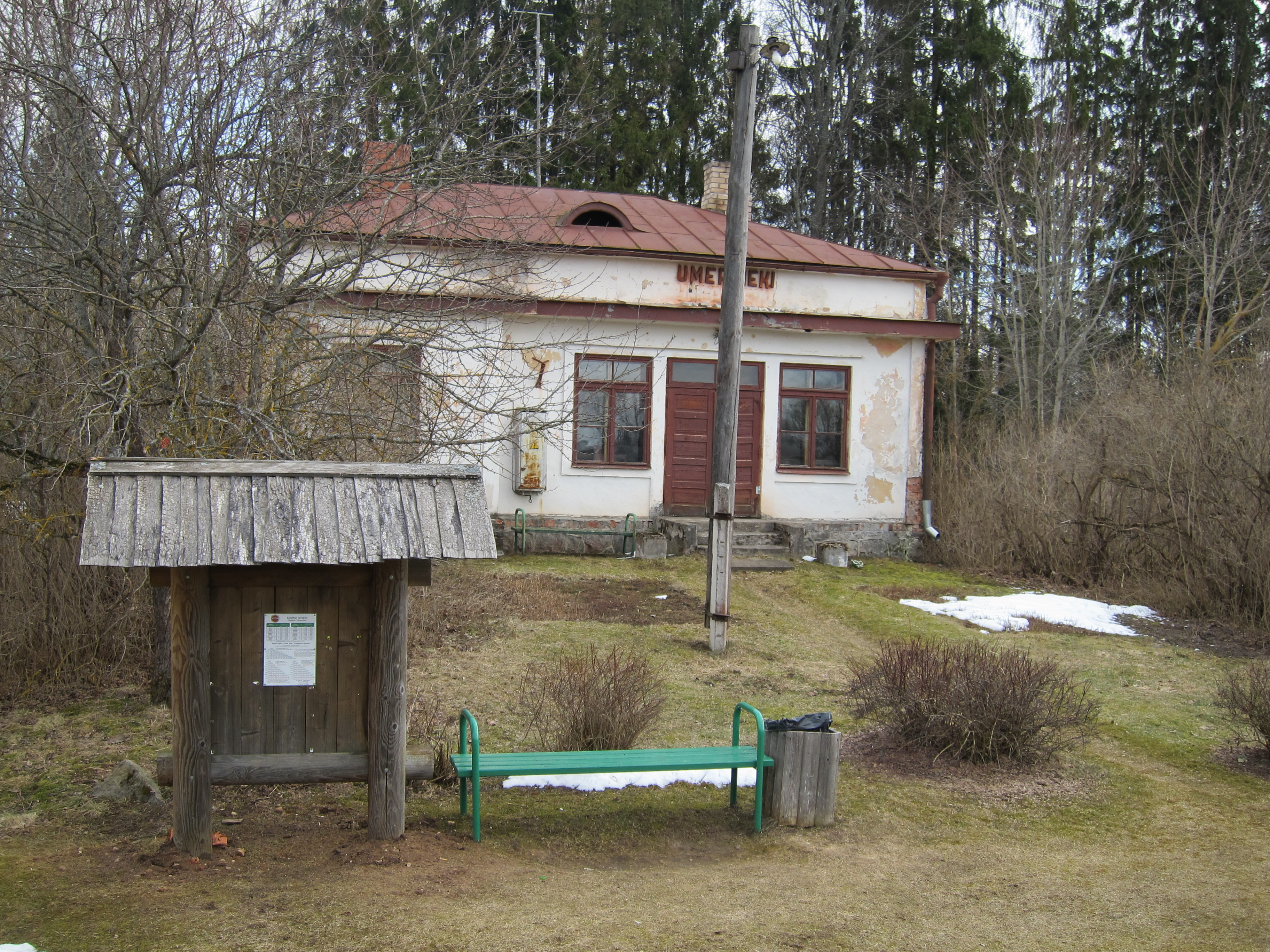 Umernieku stacijas ēka ar soliņu pasažieriem